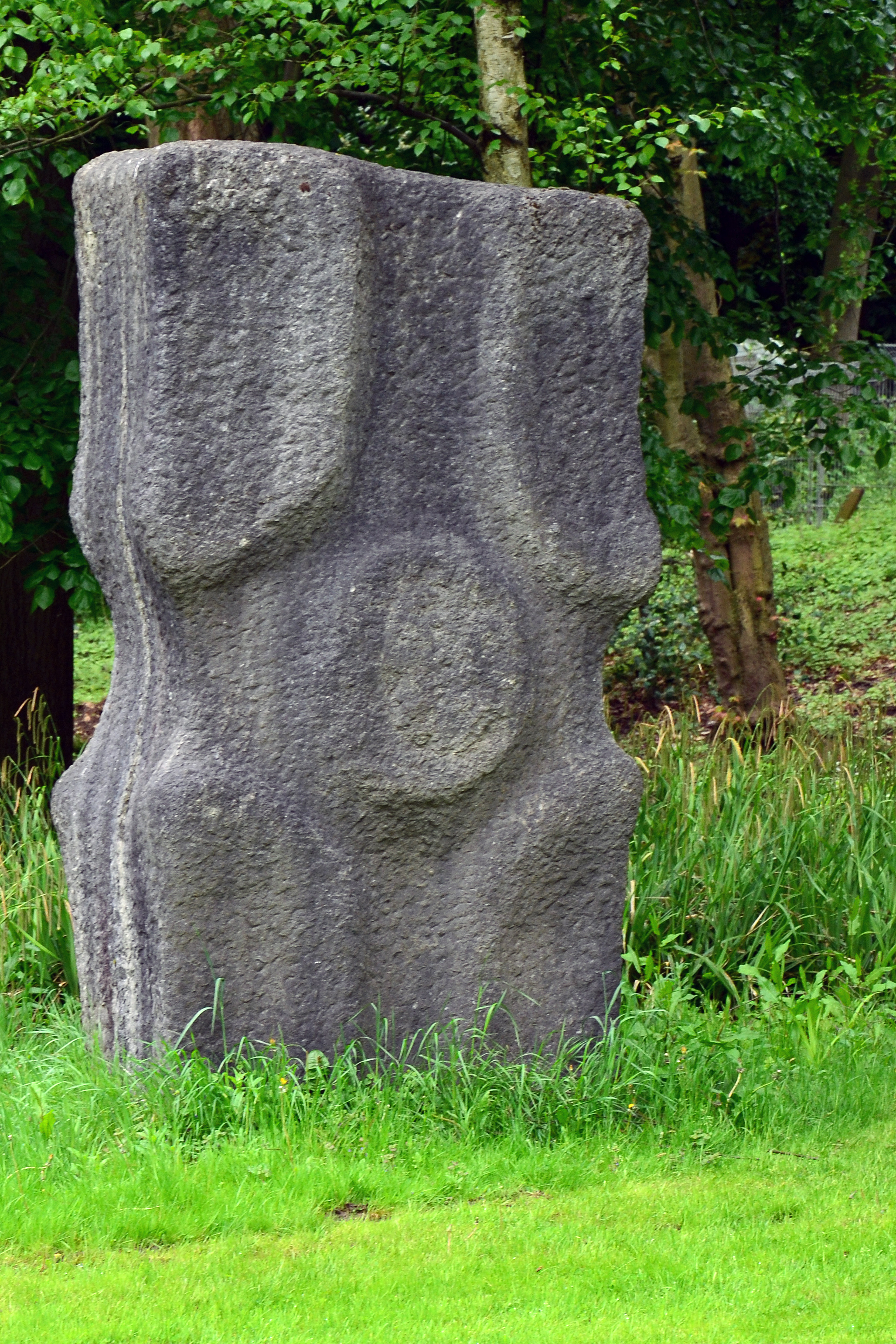 Skulpturen im Grugapark